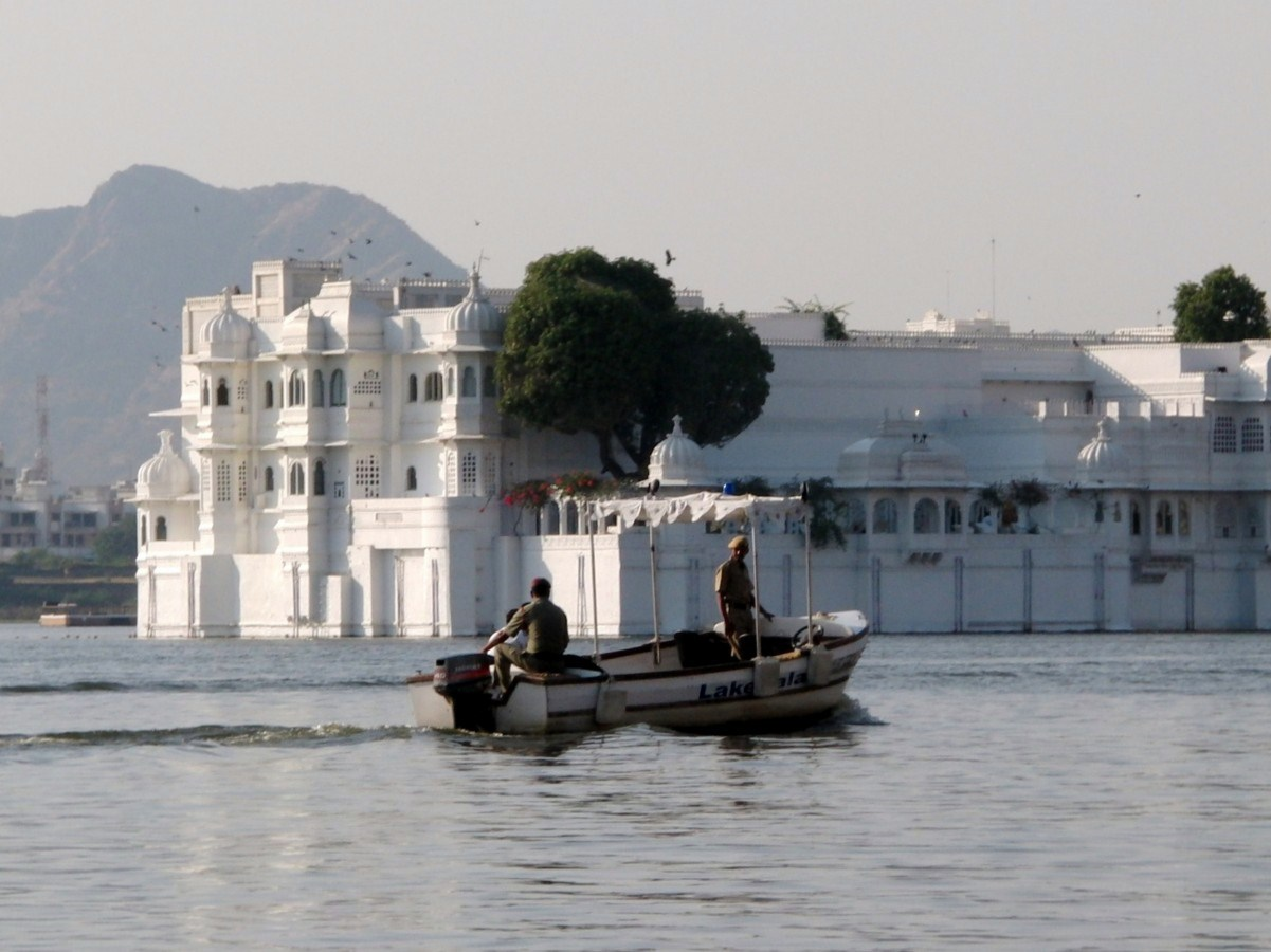 le palais de Jag Mandir sur le Lac Pichola Udaipur au Rajasthan.